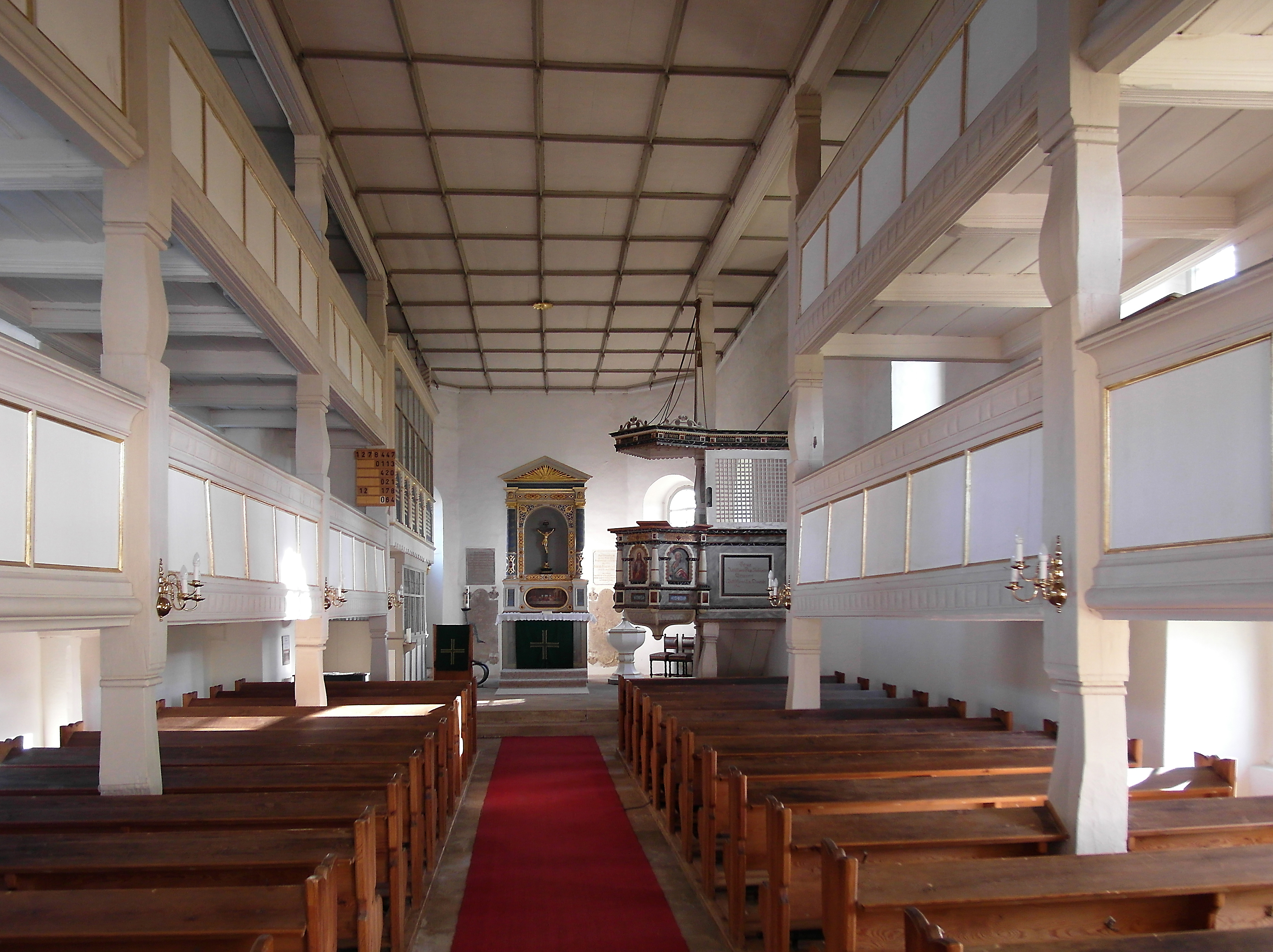 30.10.2018 01833 Dittersbach (Dürrröhrsdorf-Dittersbach), Hauptstraße 111: Evangelische Kirche (GMP: 51.036563,13.988027), errichtet nach dem Brand von 1660, Wiedereinweihung 1662. Patronatsherr war Hans Christian von Kiesewetter. Der Kirchturm wurde erst 1722 fertig. Blick zum Altar. [SAM8439.JPG]20181030320DR.JPG(c)Blobelt